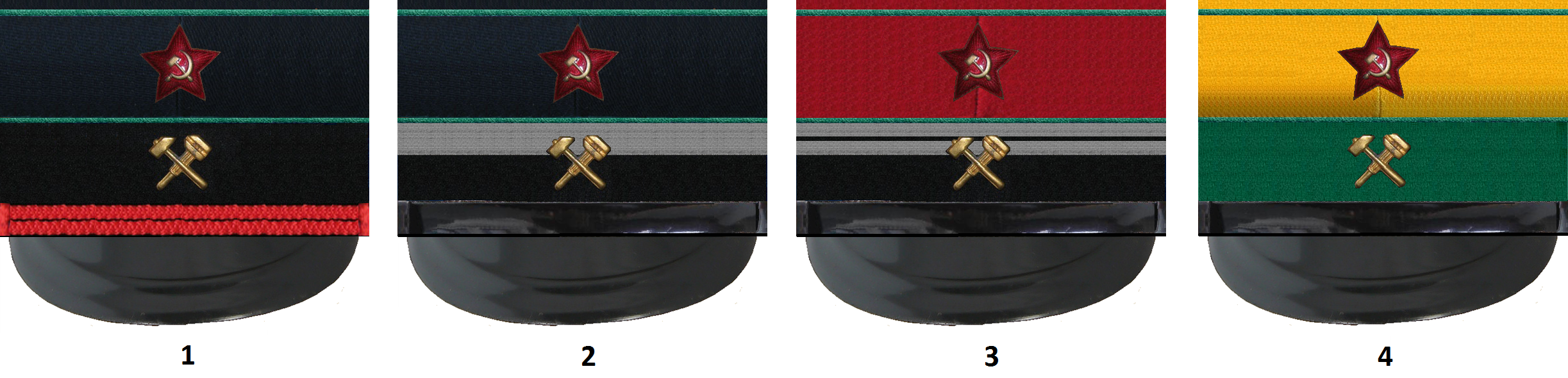 Фуражки мпс43